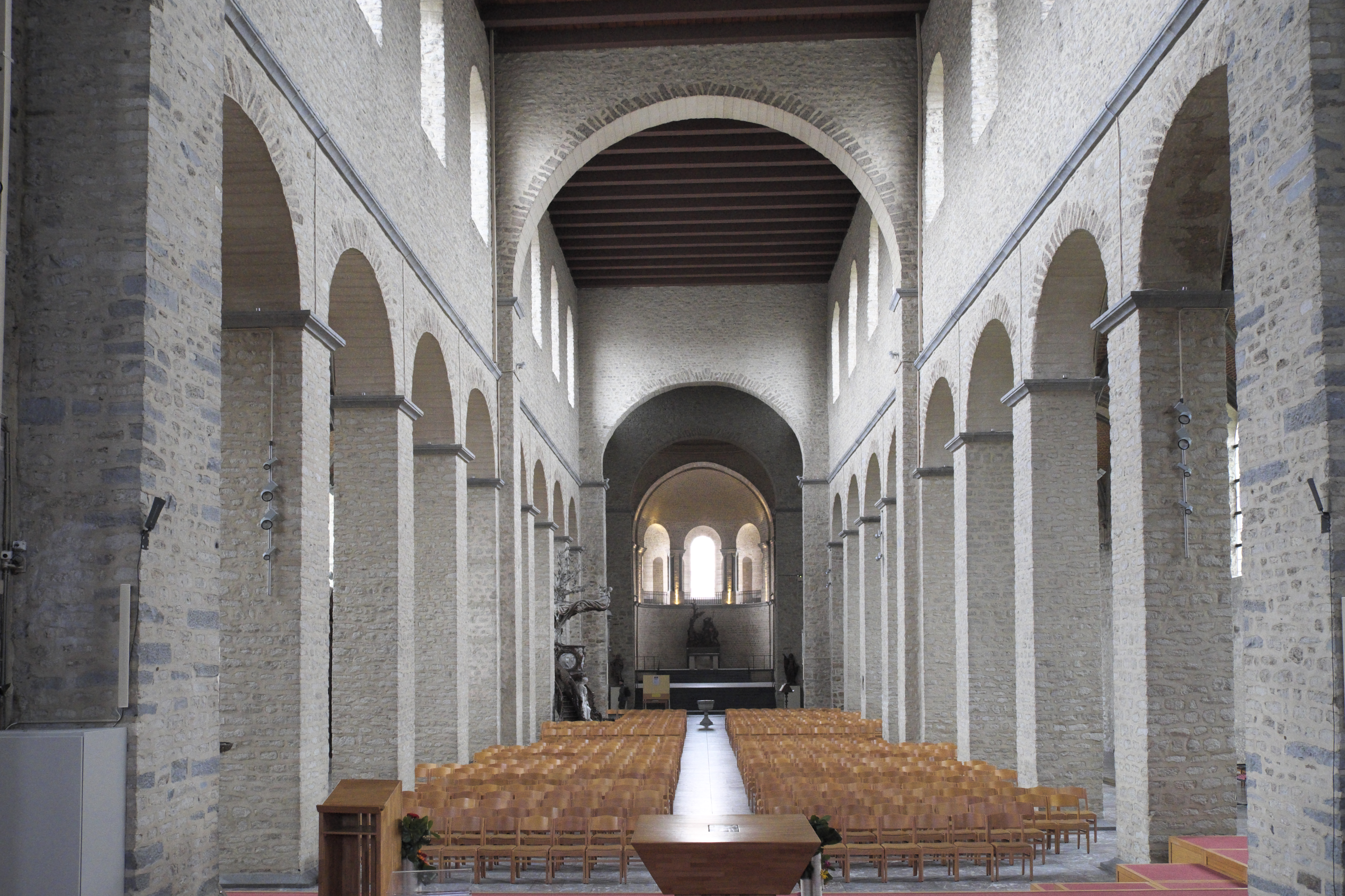 Pfarrkirche und ehemalige Stiftskirche St. Gertrud in Nivelles in der Provinz Wallonisch-Brabant (Wallonische Region/Belgien), Innenraum